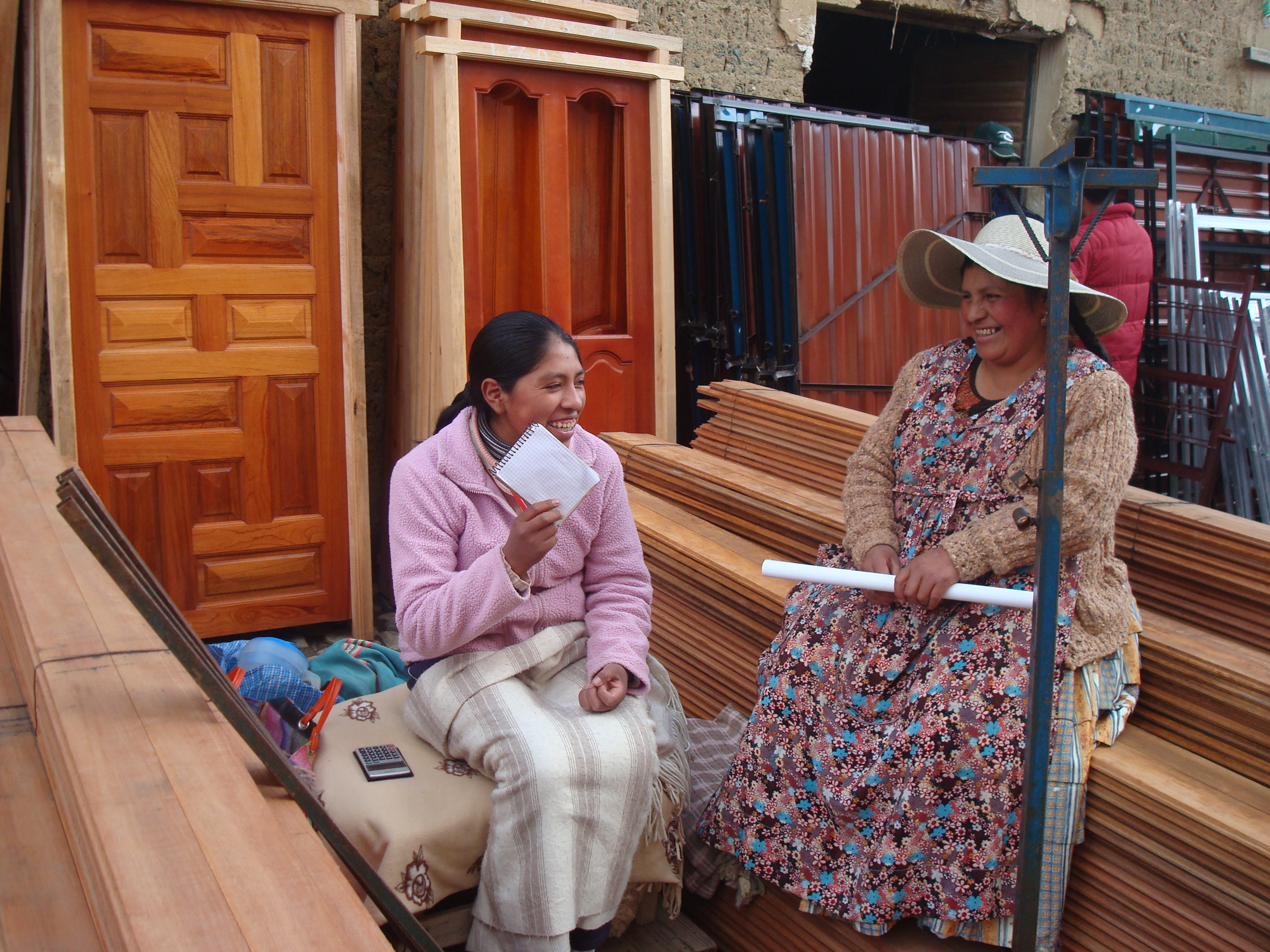 Inhaberin einer Tischlerei in El Alto (Bolivien) und ihre Schwester. Das Fotos dokumentiert, dass es in El Alto nicht nur Armut, sondern auch eine wachsende Mittelschicht gibt